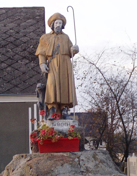 Pomnik Świętego Rocha w Lipnikach niedaleko Kościoła.